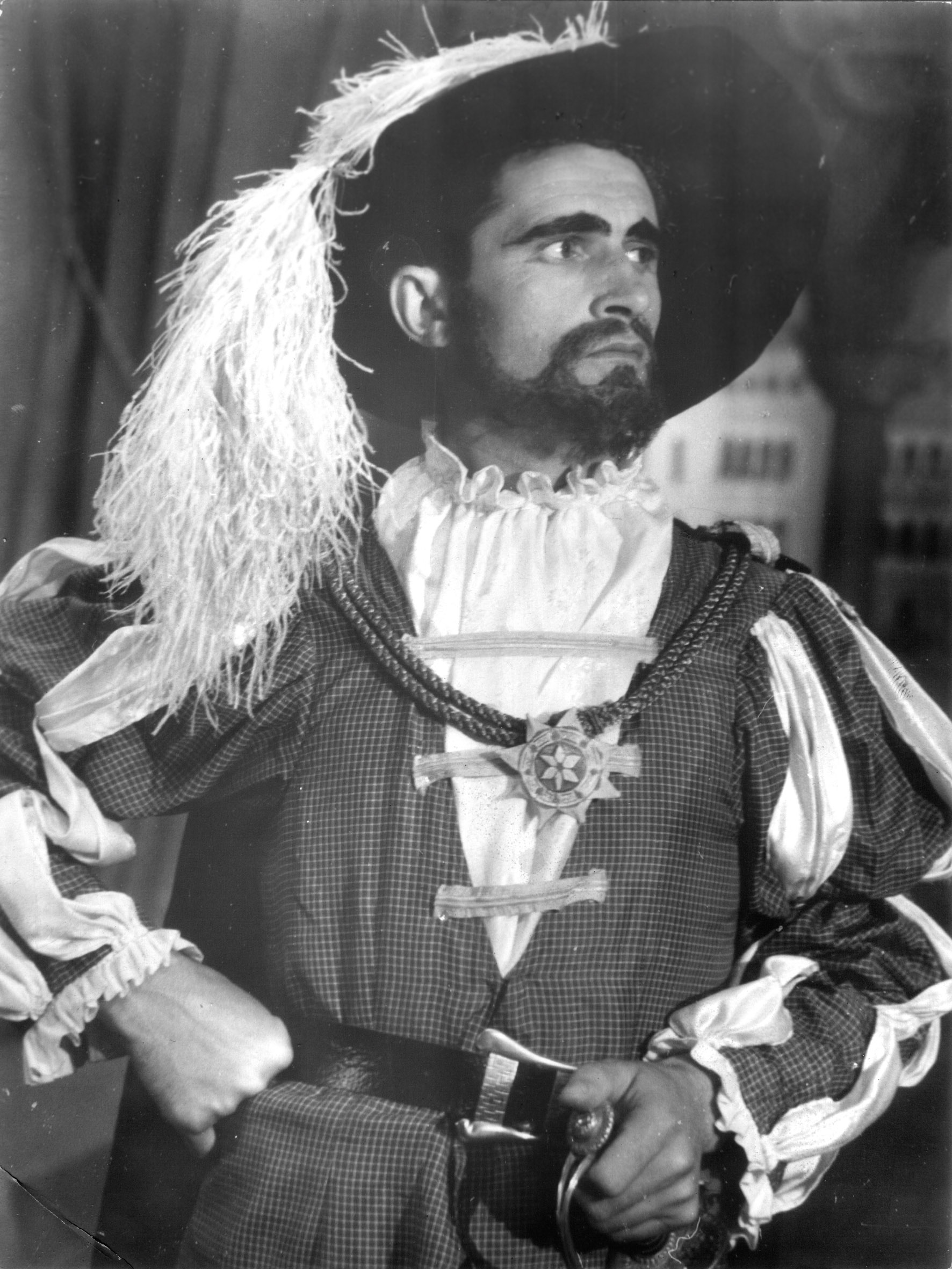 Vani Trako